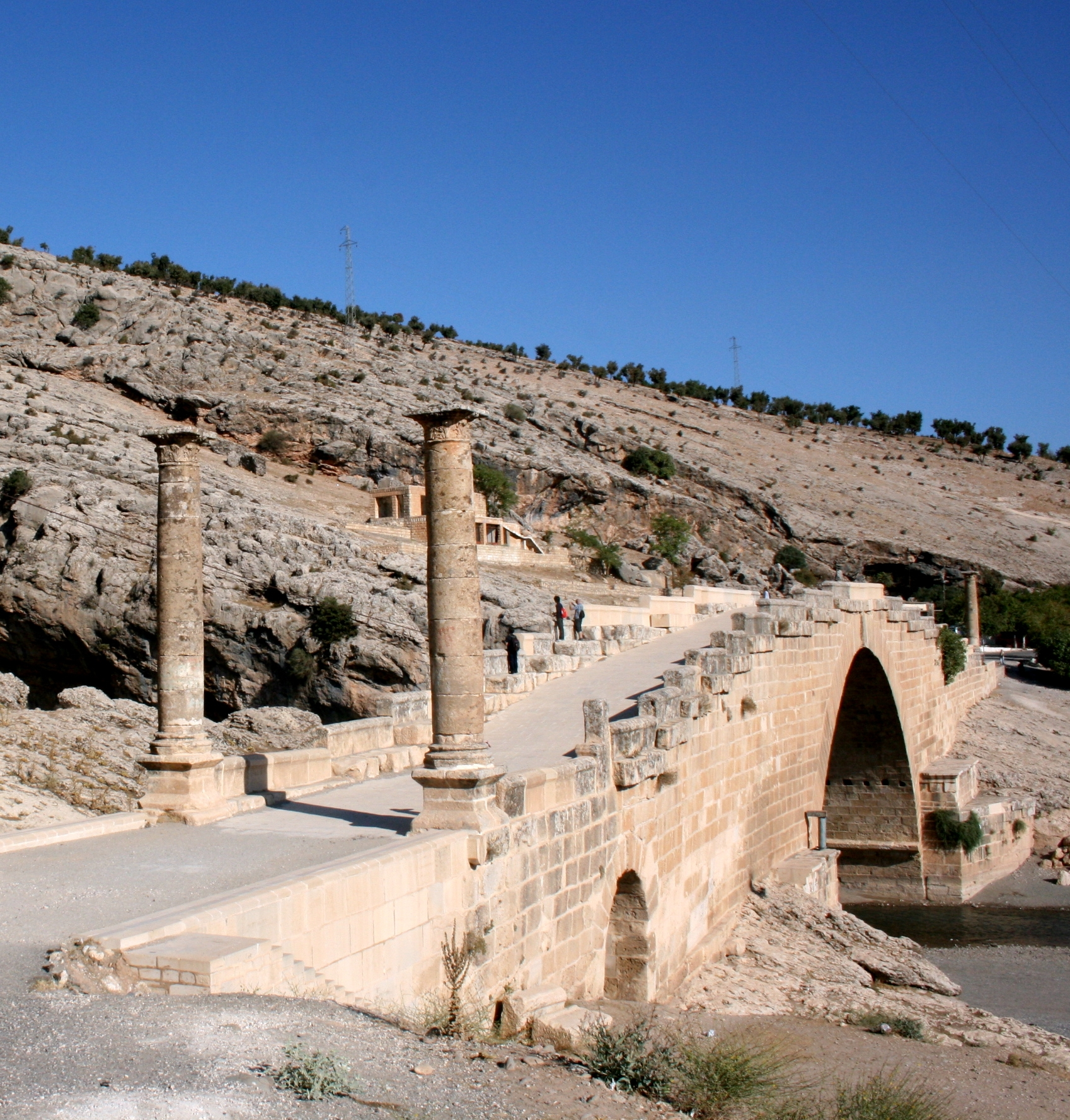 Portuguese Bridge